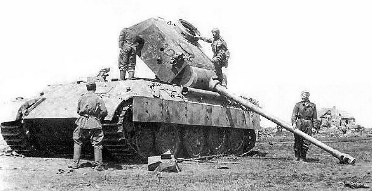 Soldati sovietici ispezionano un carro tedescdo Panther distrutto